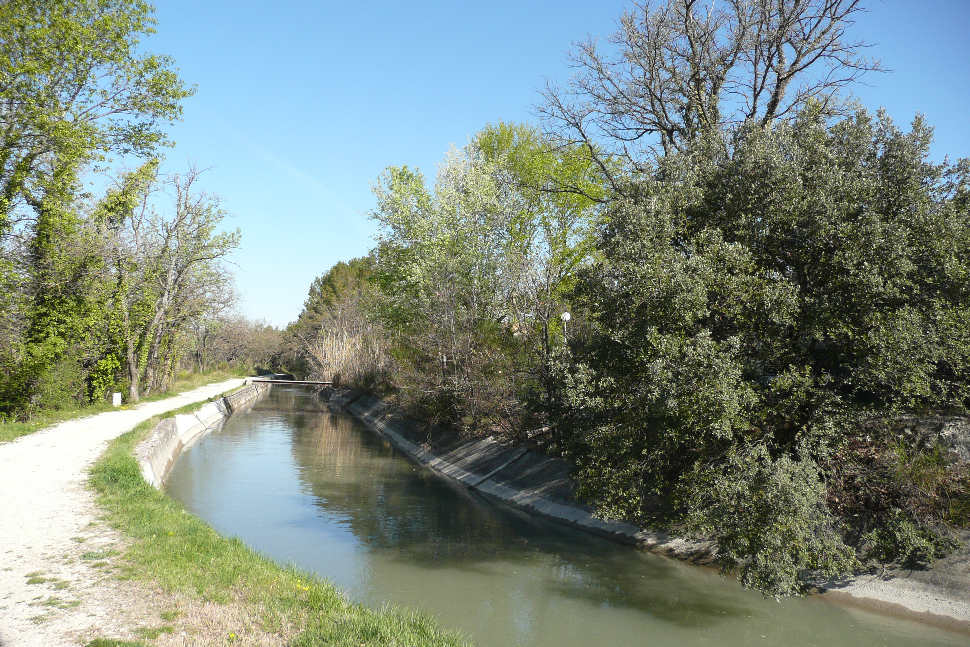 Canal de Carpentras près de Cambuisson.